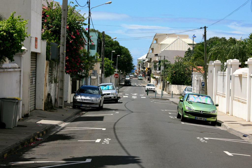 St Denis, Reunion Island